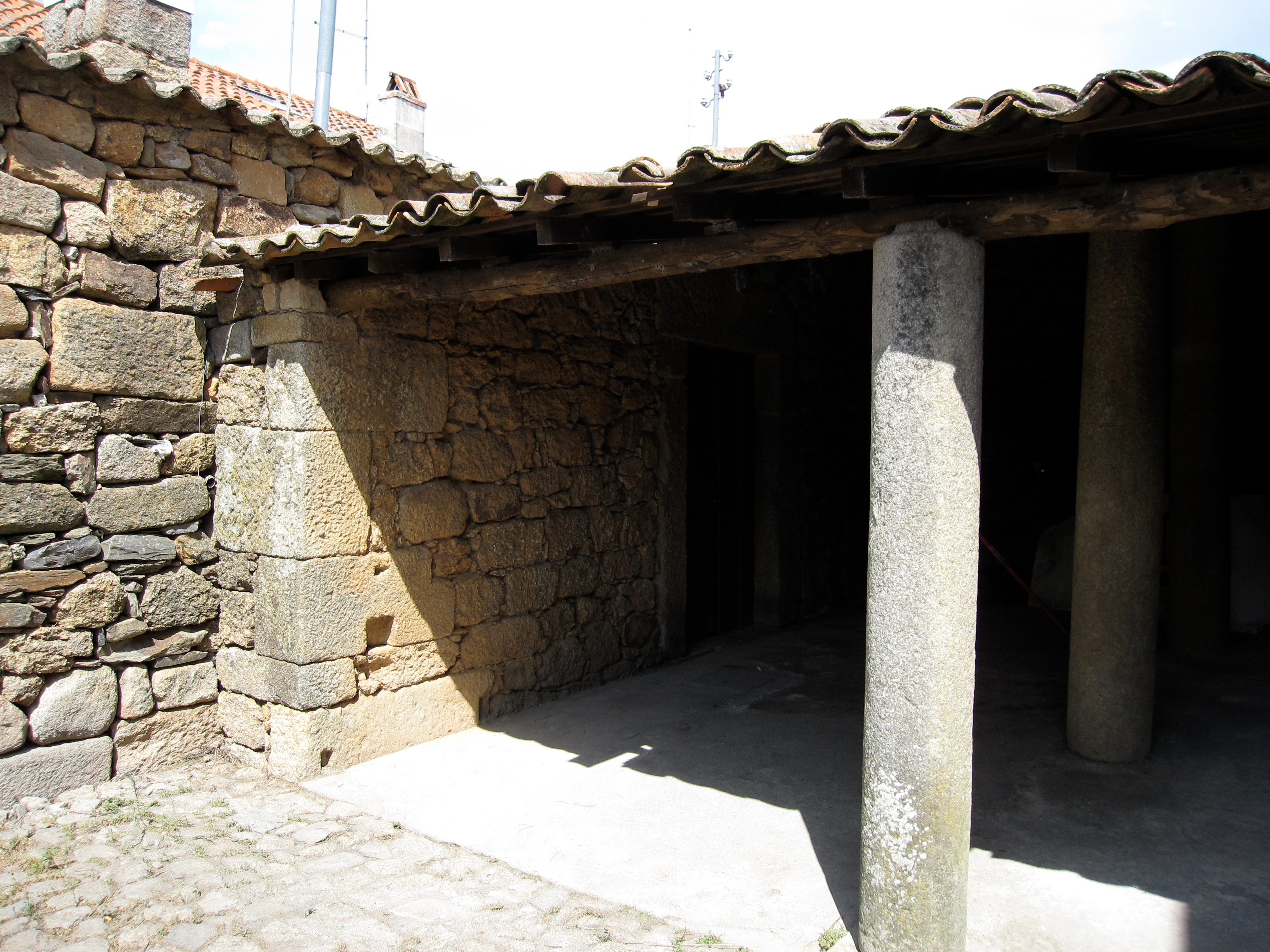 Forno Comunitário em Idanha-a-Velha / Forno do Povo. Portugal, Castelo Branco, Idanha-a-Nova, Idanha-a-Velha This file was uploaded for Wiki Loves Monuments in Portugal with the unique identifier 97021071.